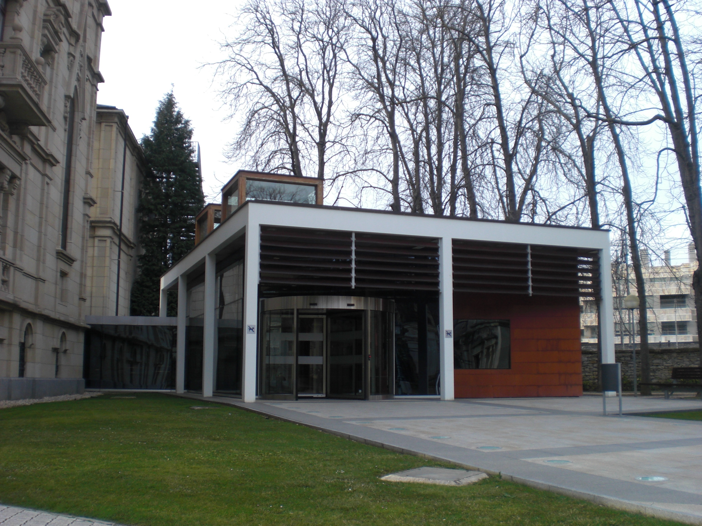 Arabako Arte Ederretako Museoaren sarrerako pabiloi berria.